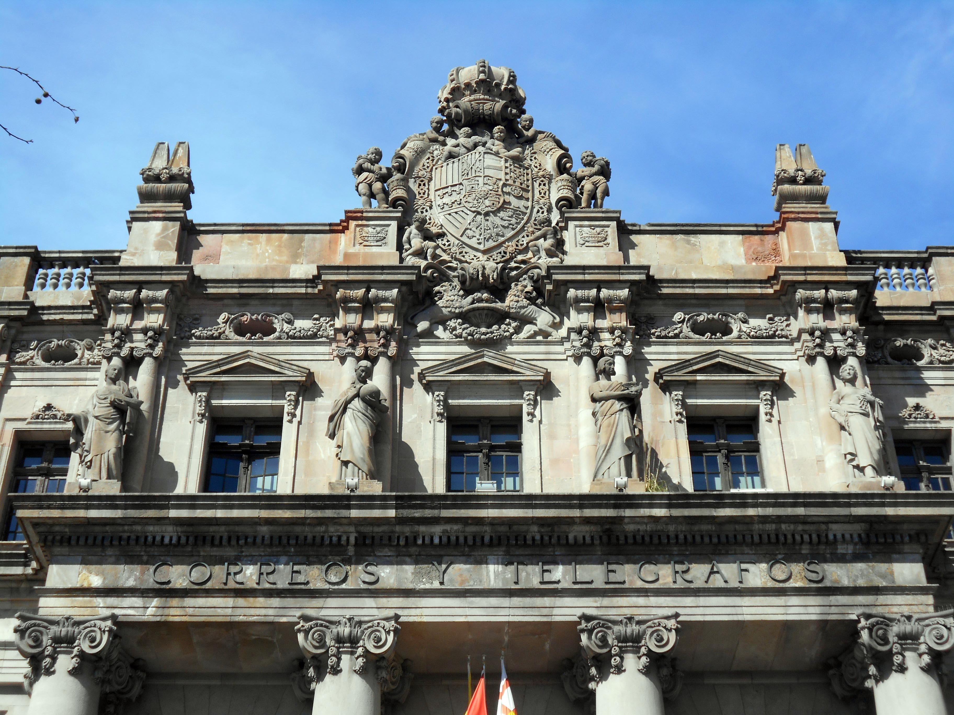 Edificio de Correos de Barcelona, detalle de la fachada principal.